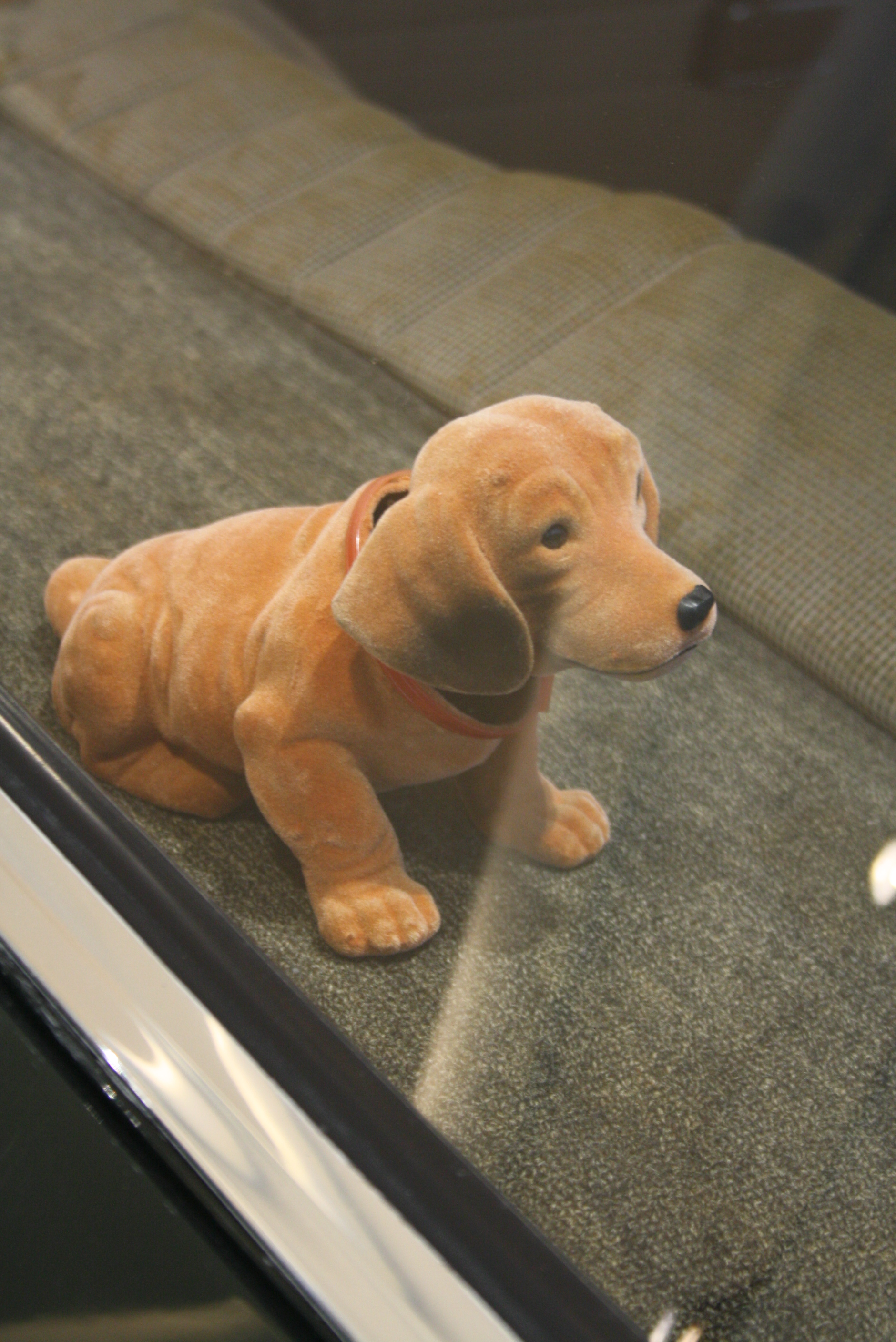 Wackel-Dackel auf der Hutablage, Erwin-Hymer-Museum Bobblehead Dachshund in Erwin-Hymer-Museum